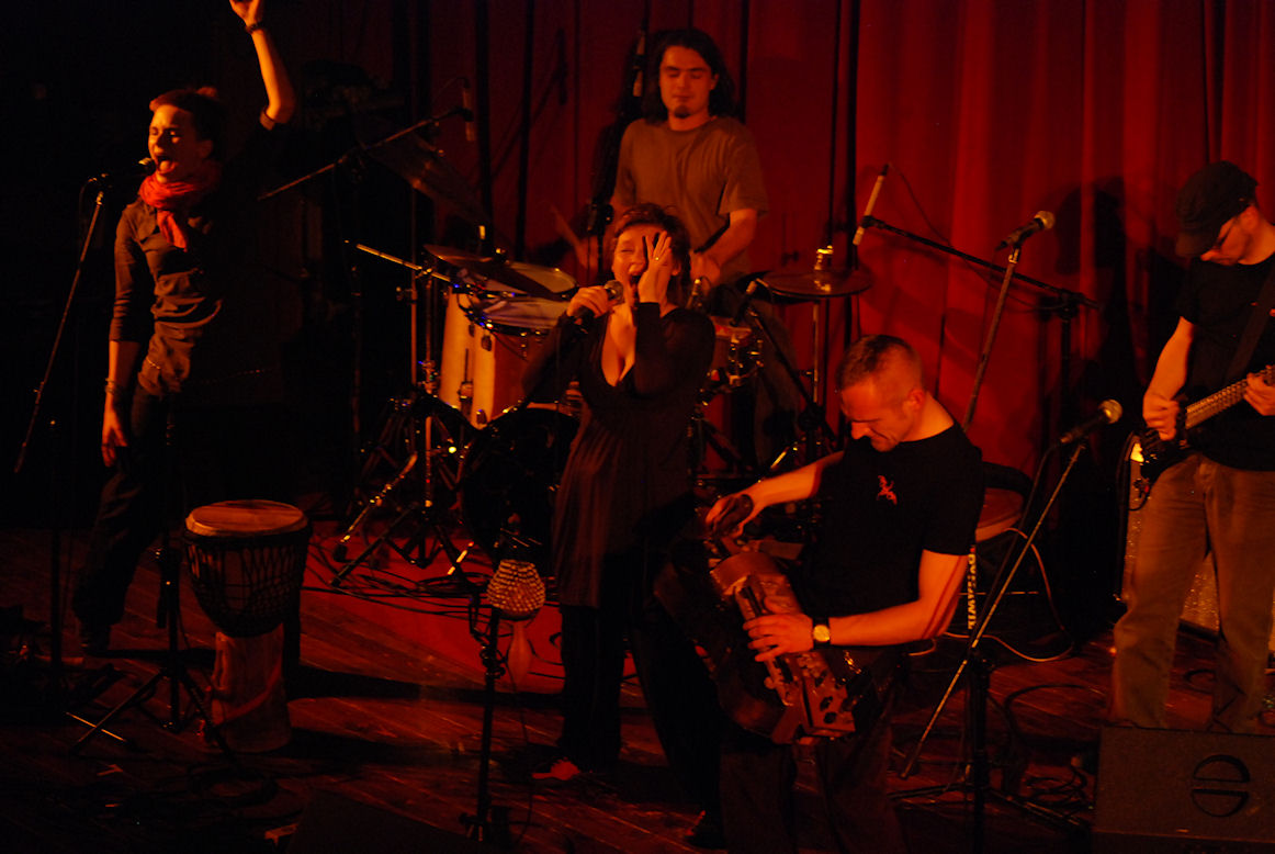 Żywiołak podczas Festivalu Ars Cameralis 2009 "Wieczór Muzyki Folkowej" w Kinoteatr "Rialto" w Katowicach 24.11.2009